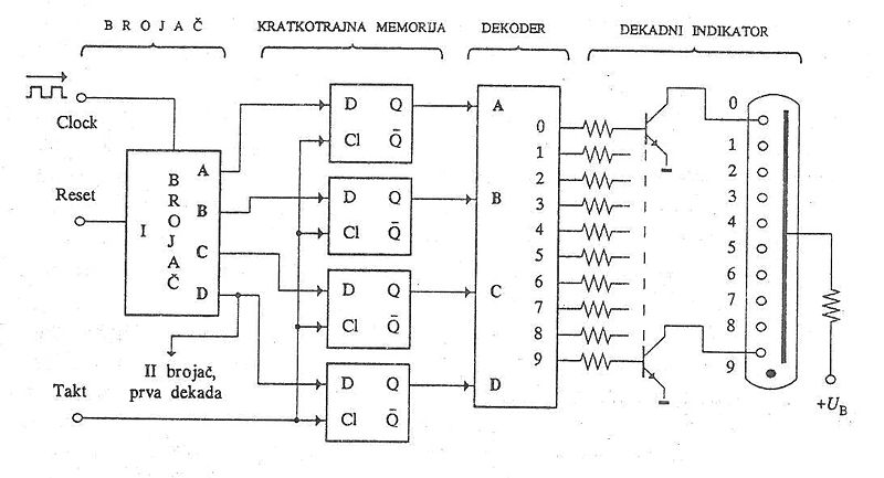 Blok šema sklopa brojač indikator.jpg